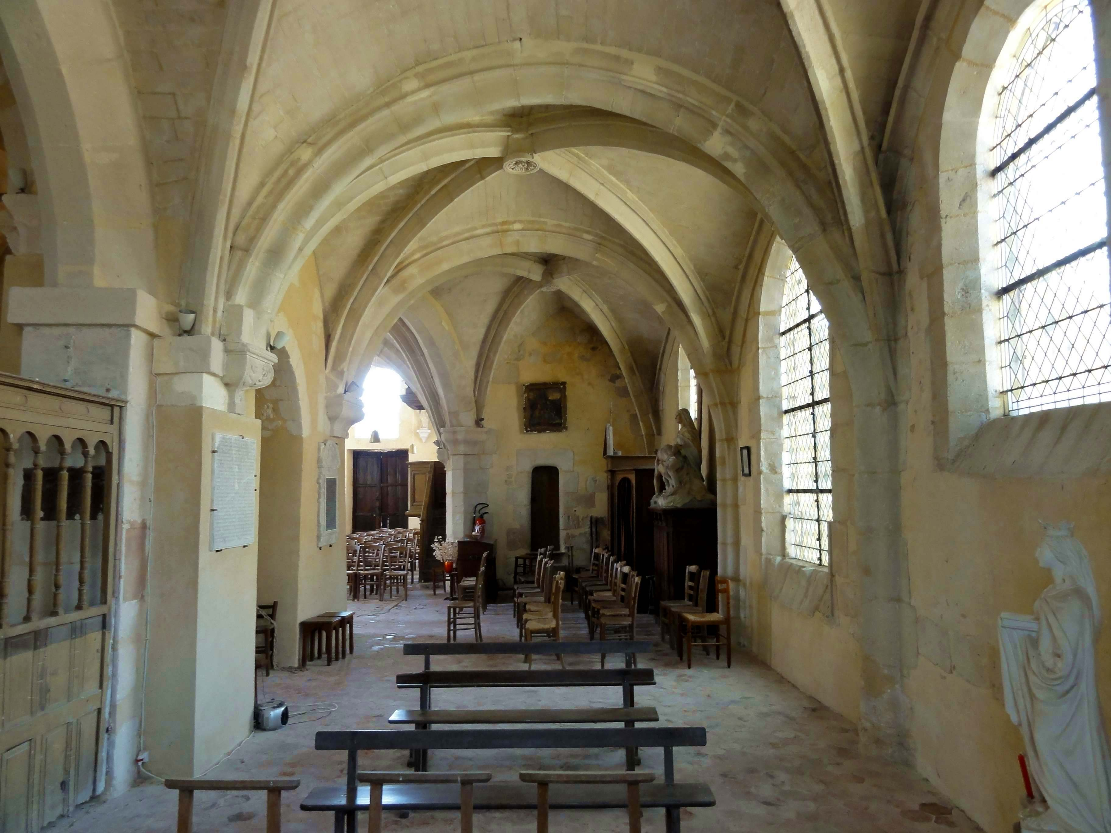 Intérieur de l'église (voir titre).